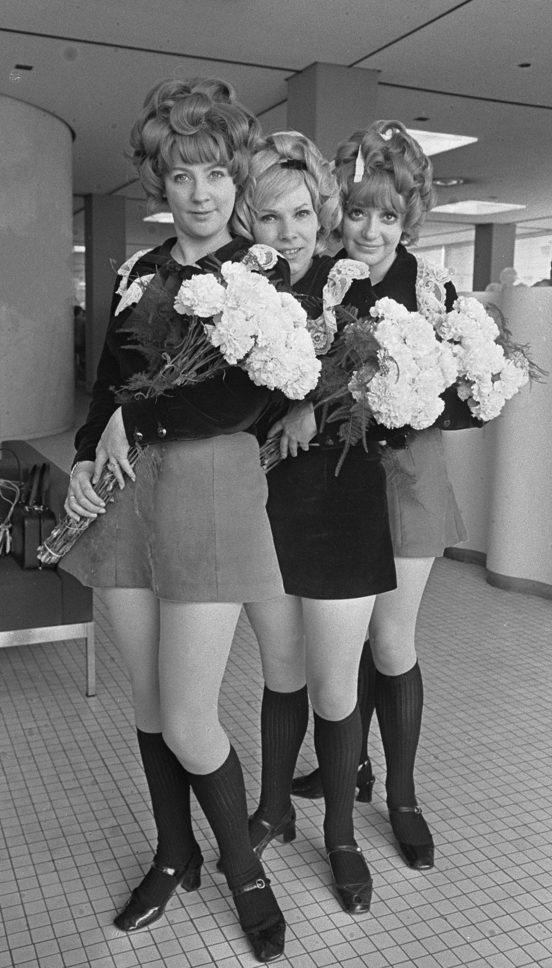 Paper Dolls (band), Schiphol